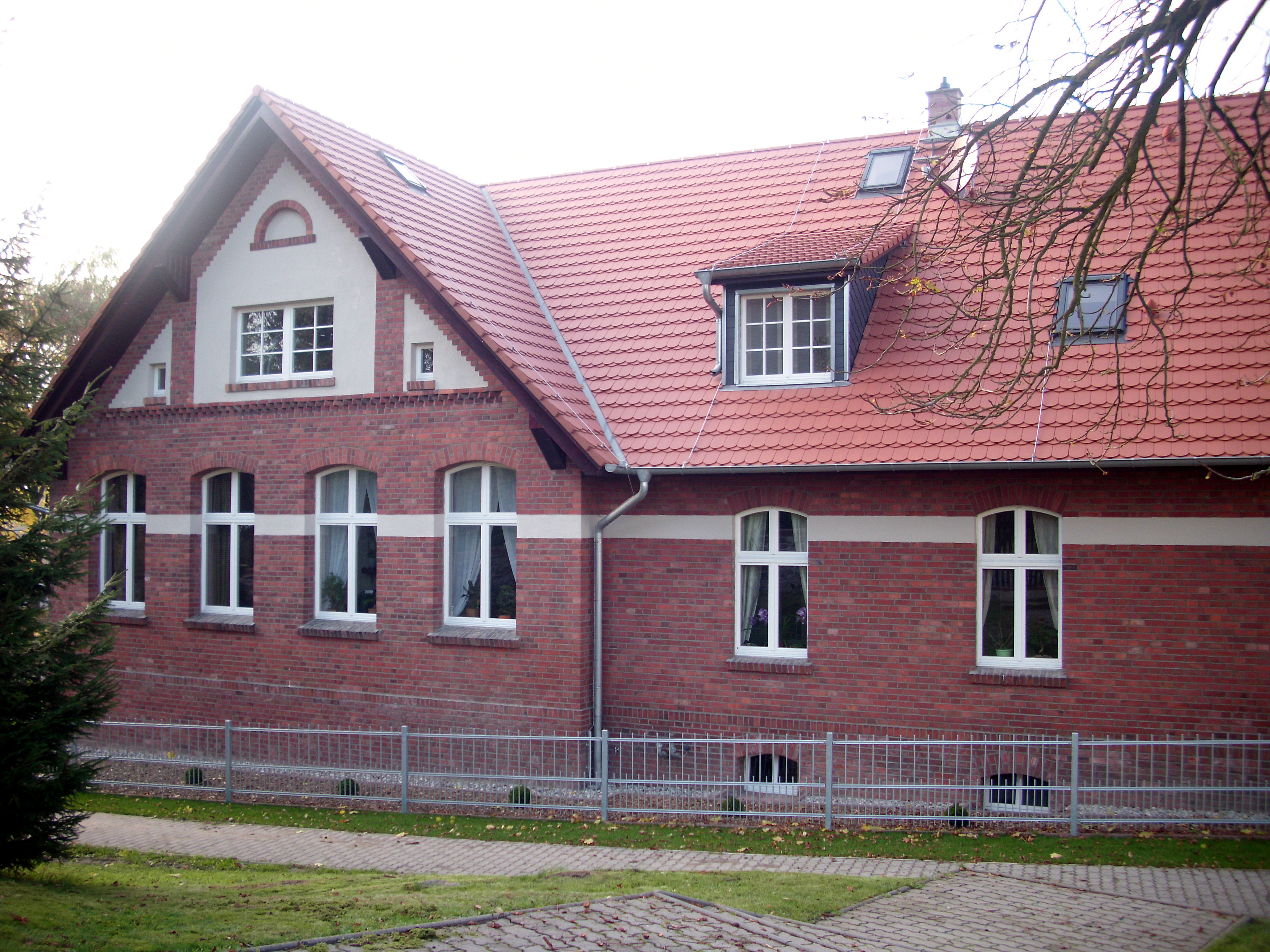 Schulgebäude, Möbiskruge, Naturpark Schlaubetal, Brandenburg